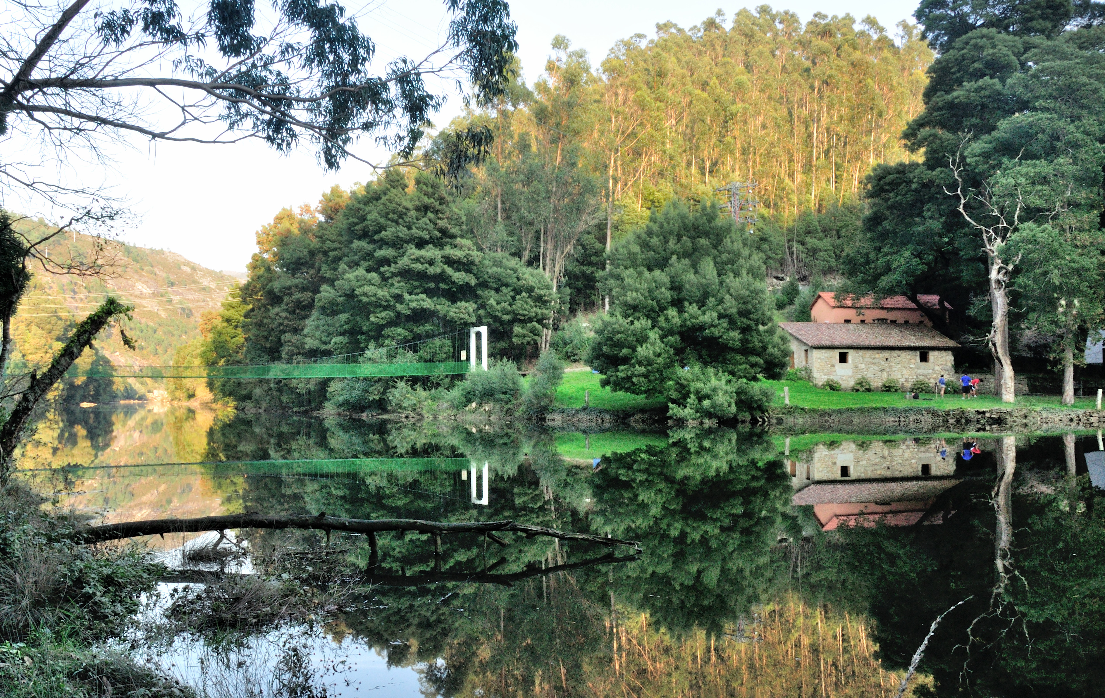 Rio Tambre en Noia